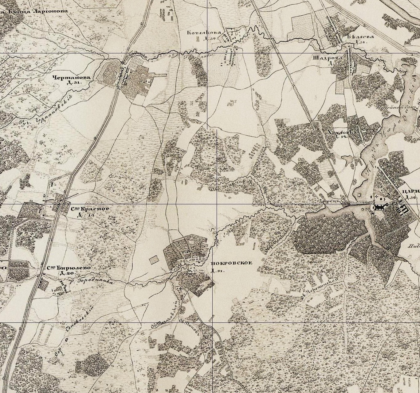 Бирюлёво, Красное, Покровское на топографической карте окрестностей Москвы 1848 года.